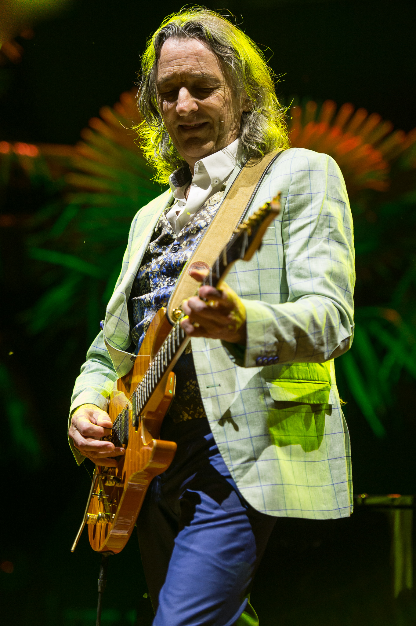 Brombachsee,Concertbüro Franken,Festival,Konzert,Lieder am See,Livekonzert,Livemusik,Musik,Roger Hodgson